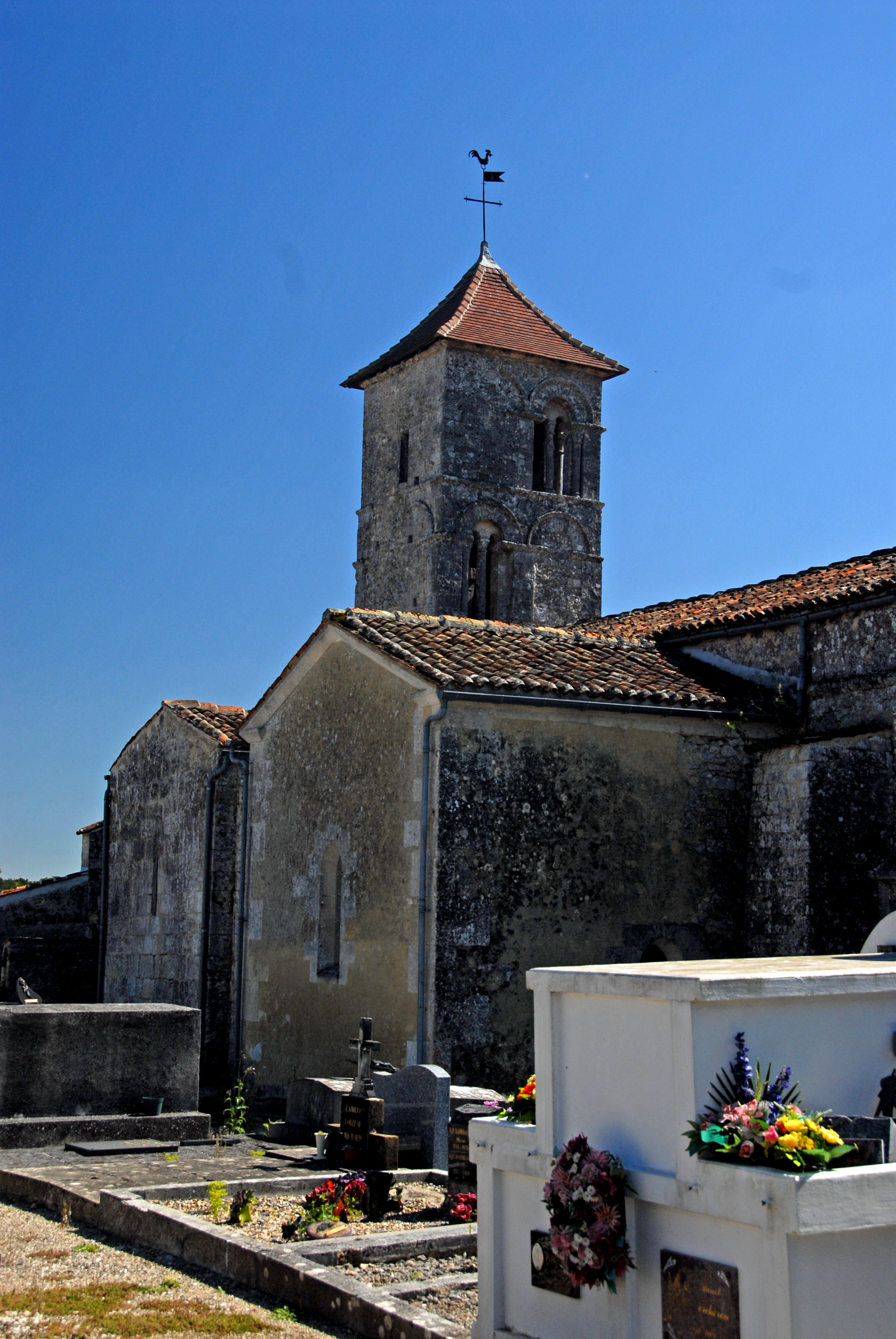 Saint-Bris-de-Bois,Ansicht von N-W